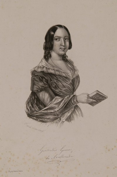 Estampa. Gertrudis Gómez de Avellaneda.